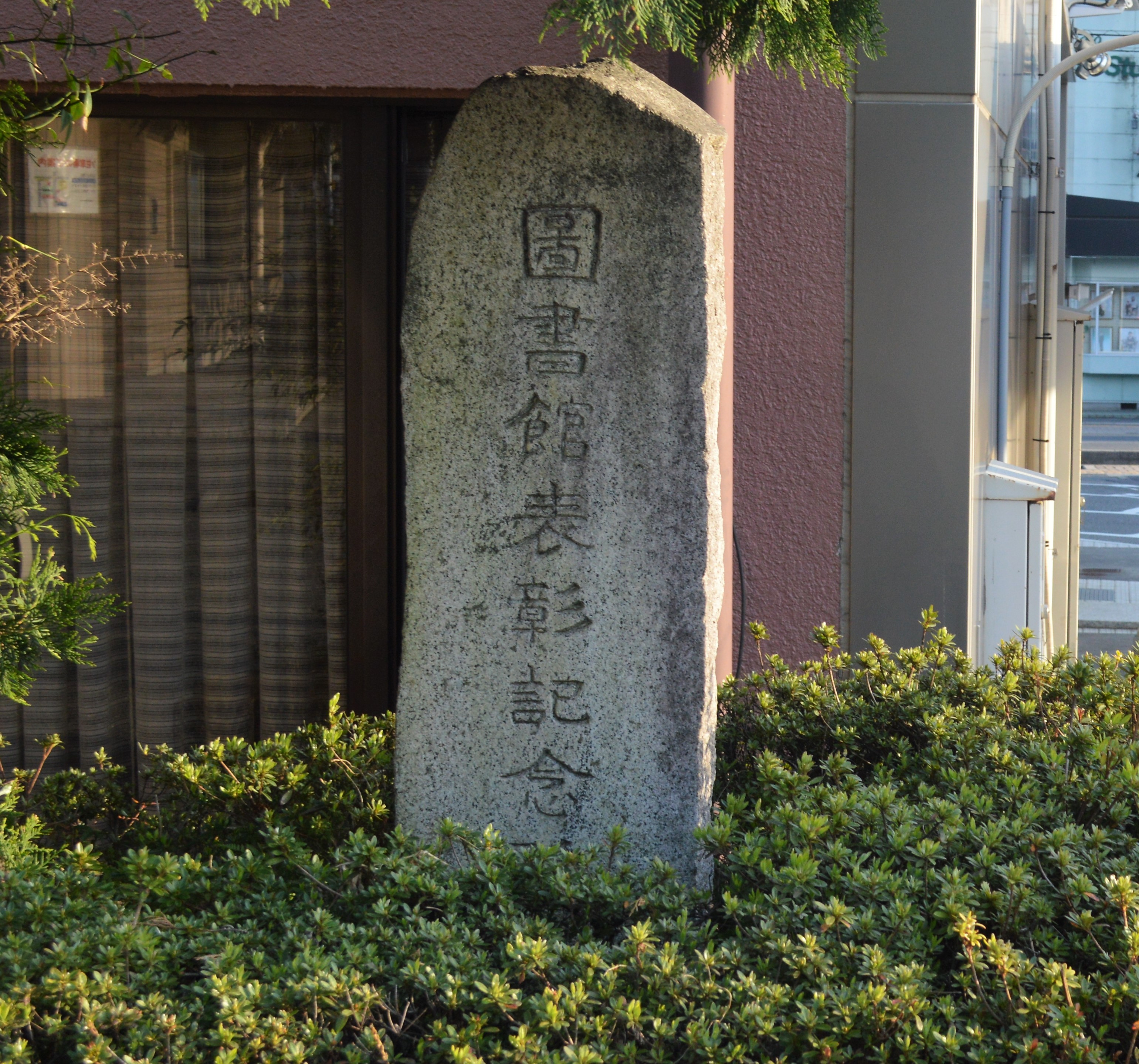 飯田市立上郷図書館にある「図書館表彰記念碑」。